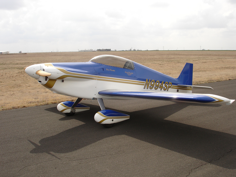 Sonerai IIL, registration N994SP